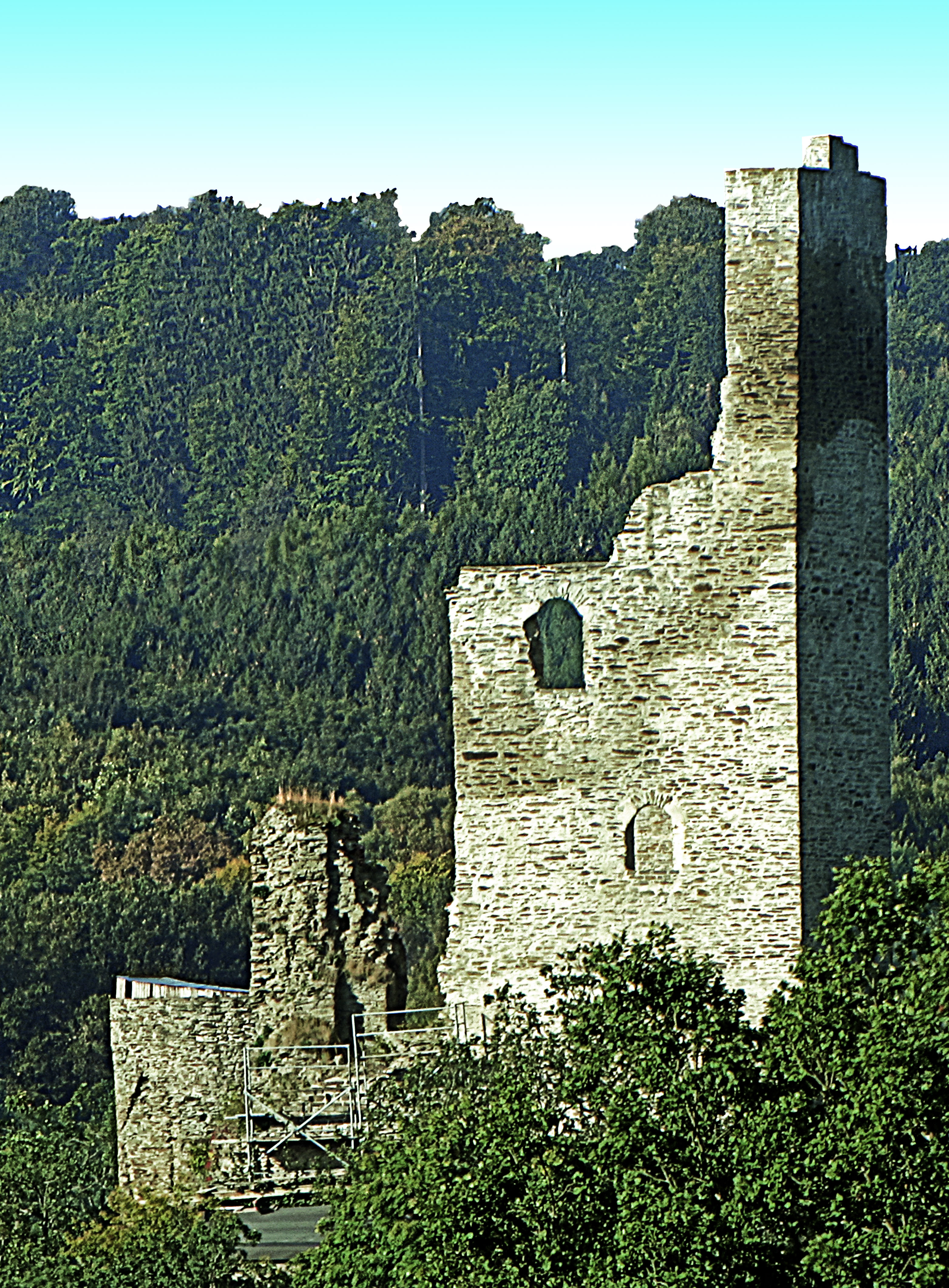 Burgruine Raubritterburg Reichenstein